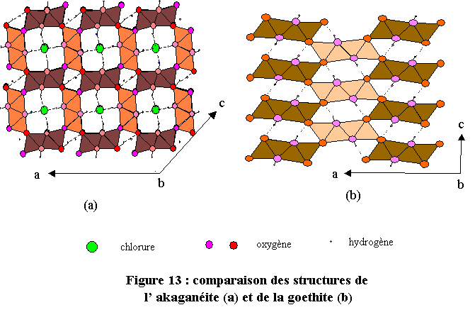 comparaison des structures de la goethite et de l'akaganéite